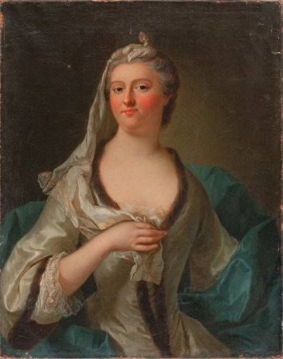 Portrait de Marie Isabelle de Rohan, duchesse de Tallard (1699 - 1754) Gouvernante des Enfants de France Huile sur toile. (au revers deux pièces de renfort, dont une en bas à gauche). Annoté au revers sur la toile d'origine à la peinture : à duchesse de Tallard. 80,5 x 64 cm. Voir la reproduction ci-contre. La duchesse de Rohan-Soubise succéda en 1735 à Charlotte de la Mothe -Houdancourt, duchesse de Ventadour, dans la fonction de gouvernante des enfants de Louis XV, assistée de sa fille Anne - Geneviève de Lévis. En 1754 elle fut remplacée par Marie - Louise Geneviève de Rohan-Soubise (1720 - 1803), comtesse de Marsan.